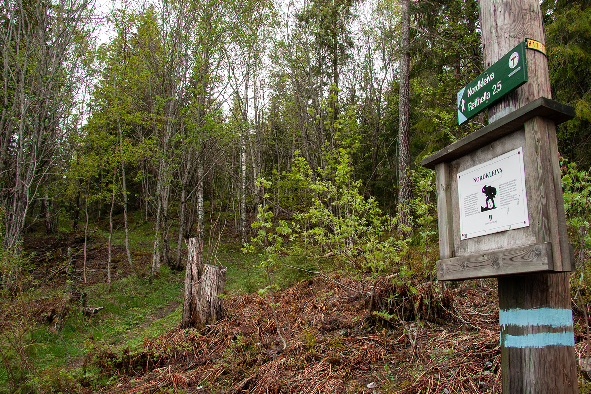 Veiskillet der Nordkleiva og Sørkleiva skiller lag.